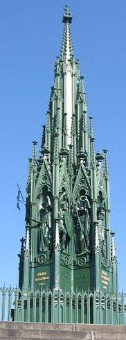 Nationaldenkmal auf dem Kreuzberg, Berlin Selbst fotografiert, September 2004 GNU FDL